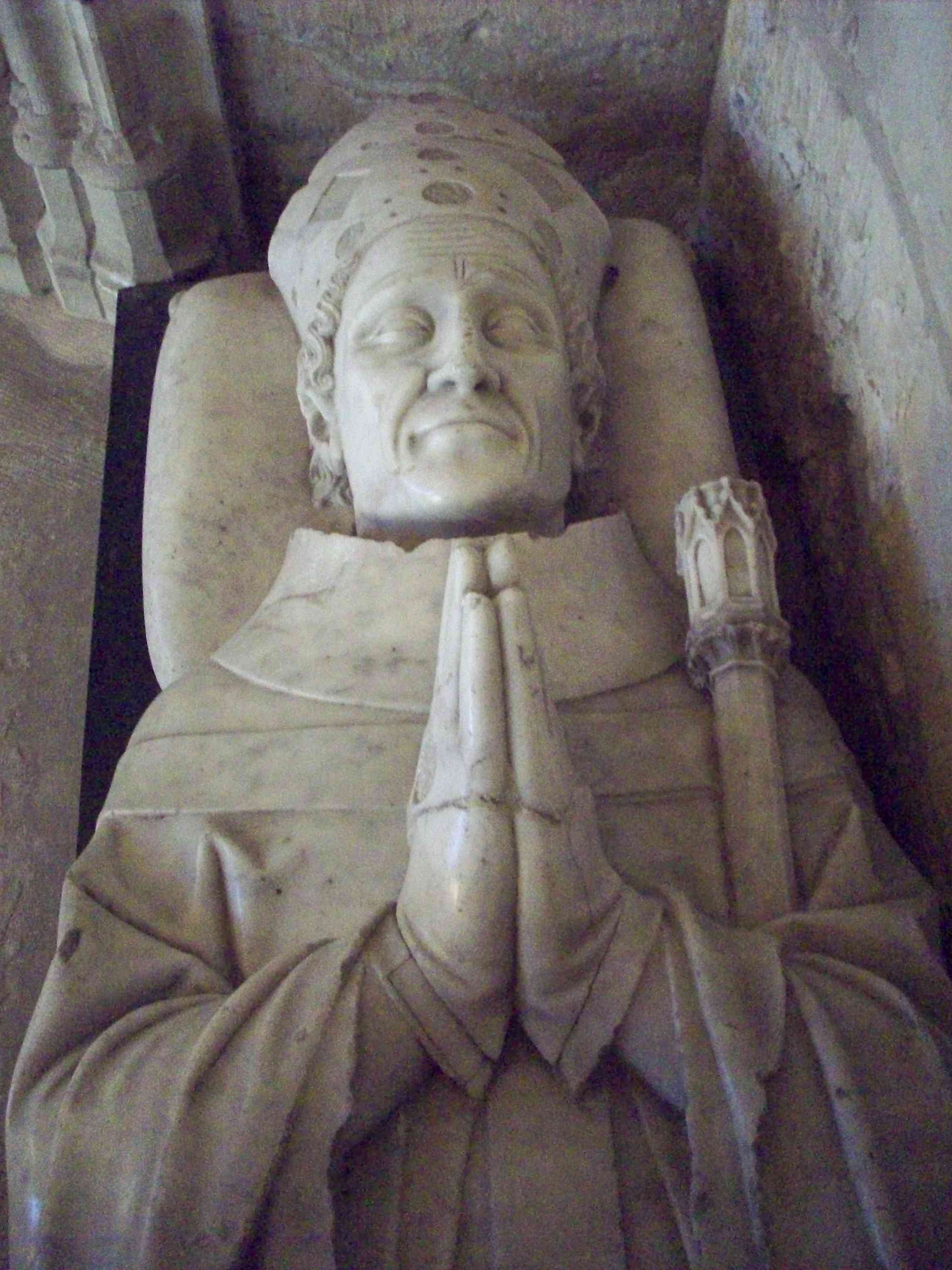 Gisant de Jean de Marigny dans la collégiale d'Ecouis.